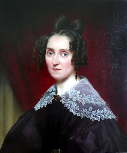 Луиза Фарранк Louise Farrenc